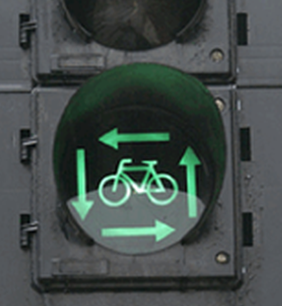 voetgangers en fietsers op kruispunten krijgen uit alle richtingen tegelijk groen licht en op dat moment moeten automobilisten stoppen voor rood licht